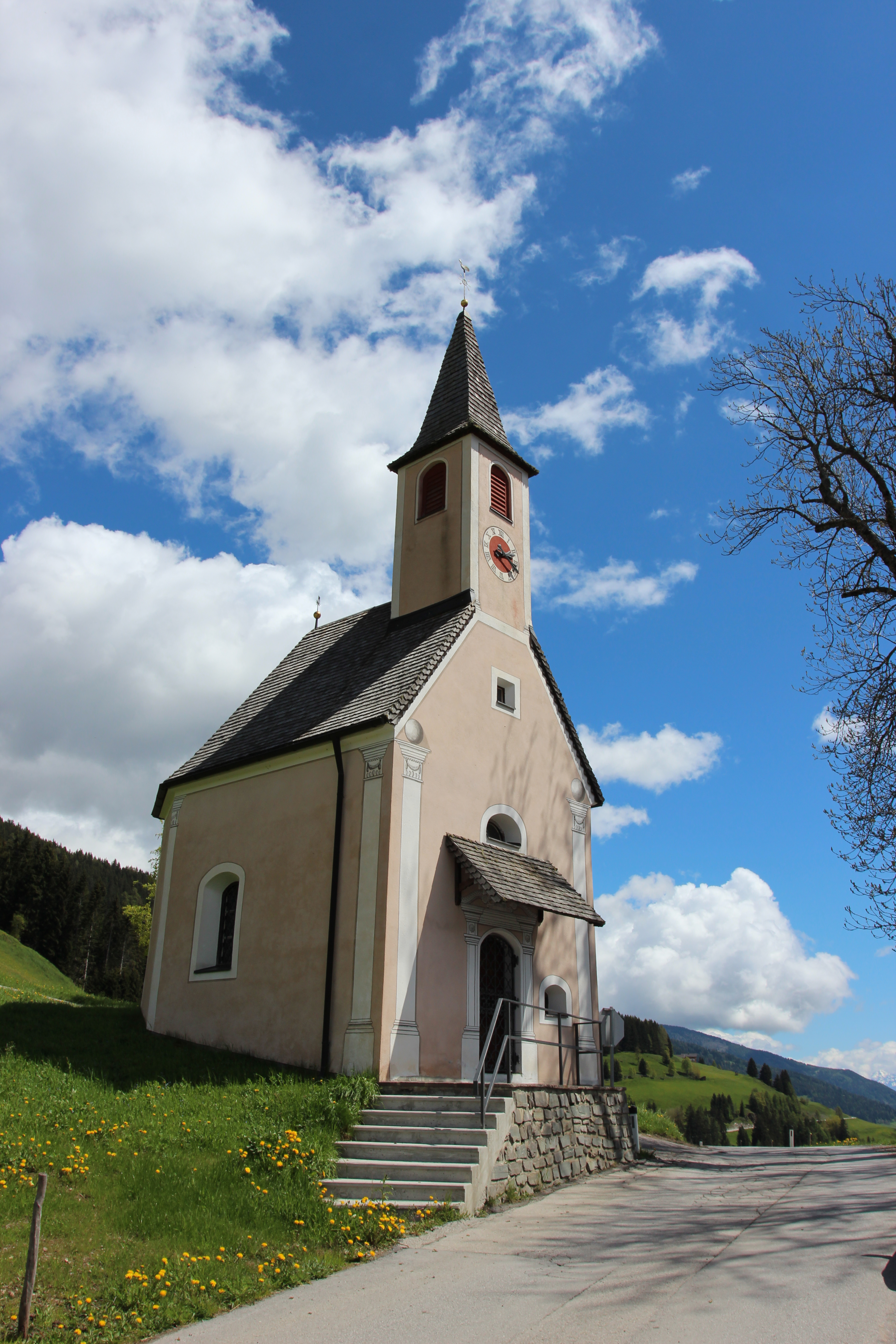 Kostenkapelle in der Gemeinde Assling, Osttirol, Österreich.